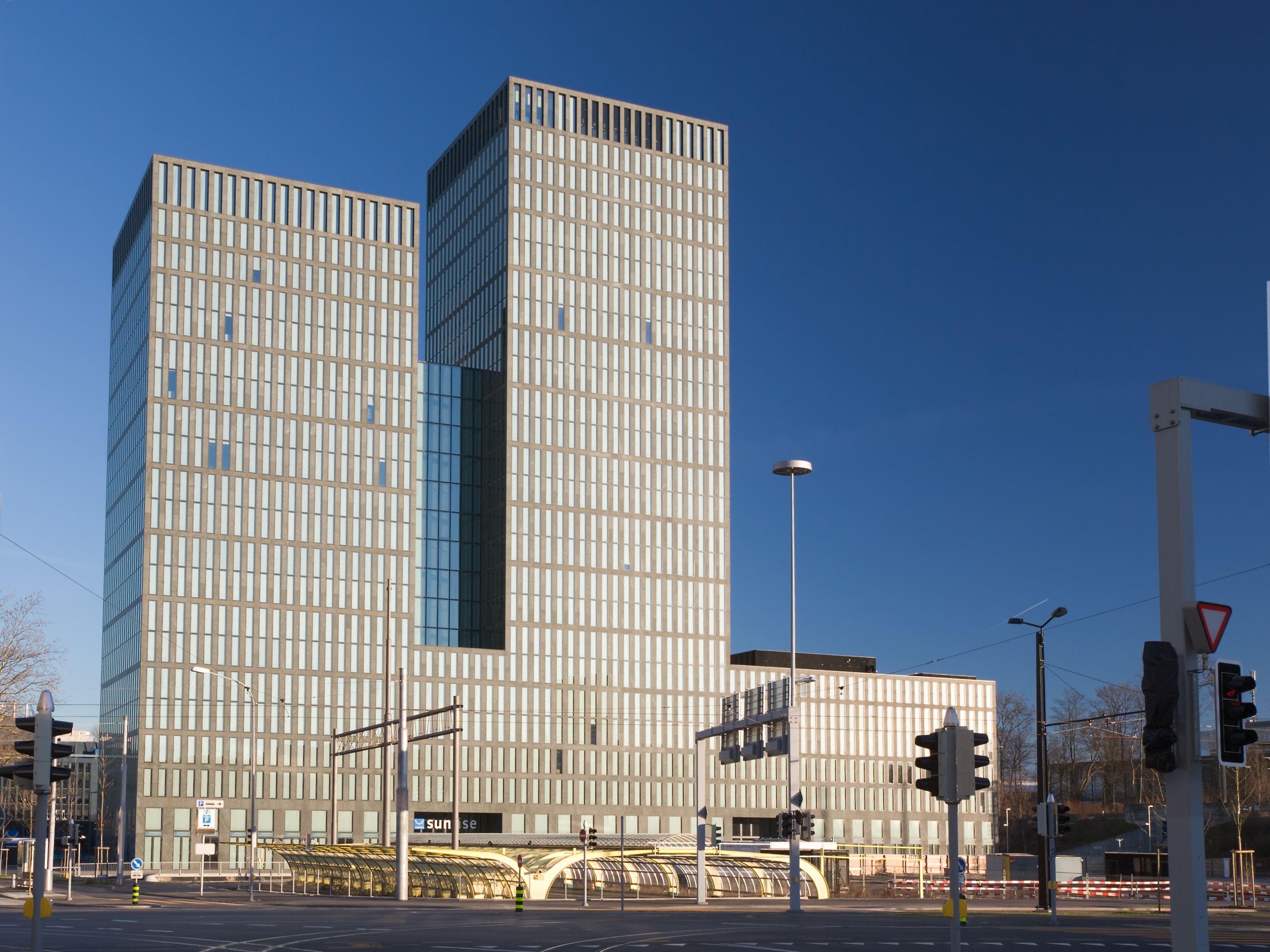 Das Sunrisehochhaus in Zürich Nord, Schweiz